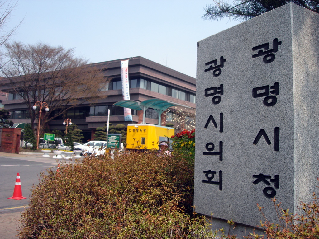 광명시청의 모습